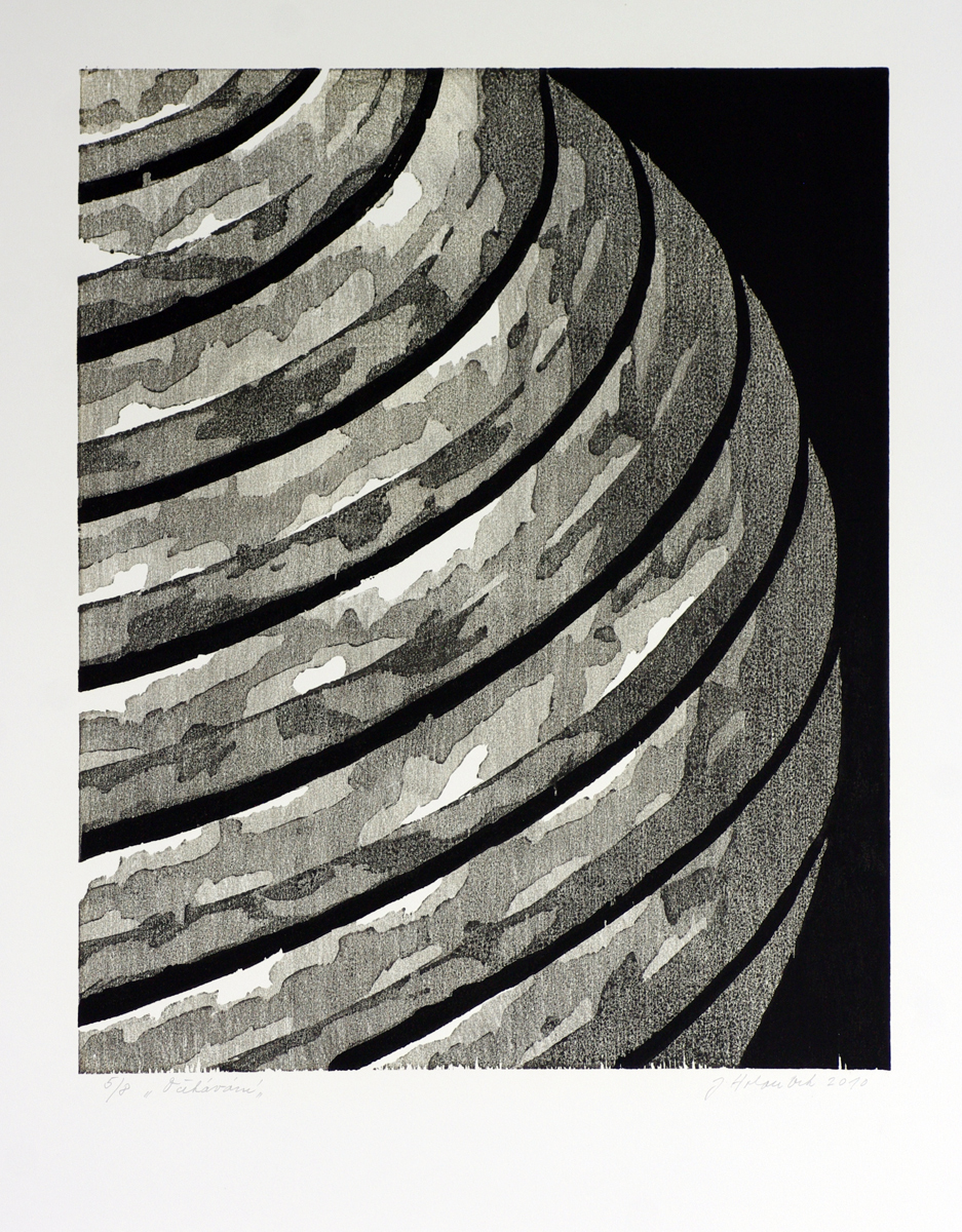 Jan Holoubek, Očekávání, dřevořez, 2010